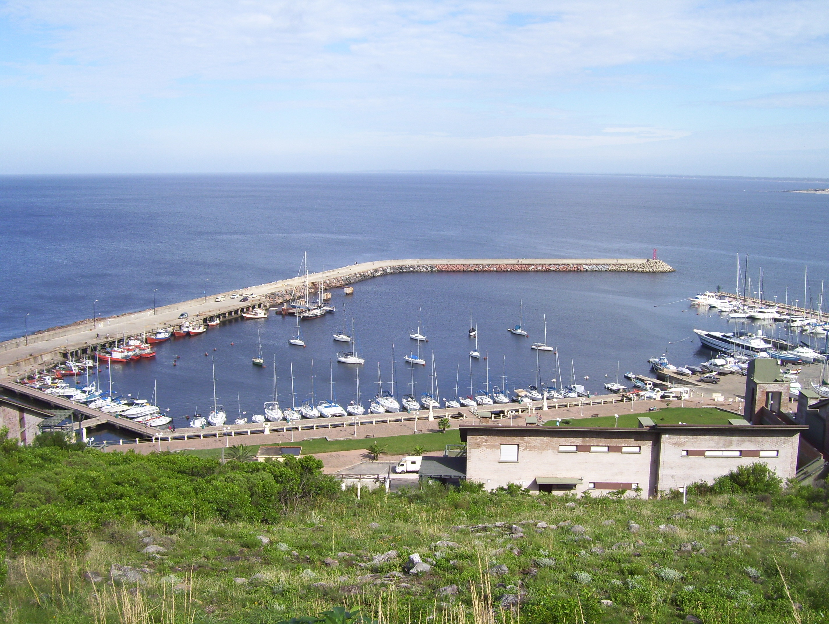 Vista del puerto de Piriápolis desde el cerro San Antonio, Municipio de Piriápolis, Maldonado, Uruguay